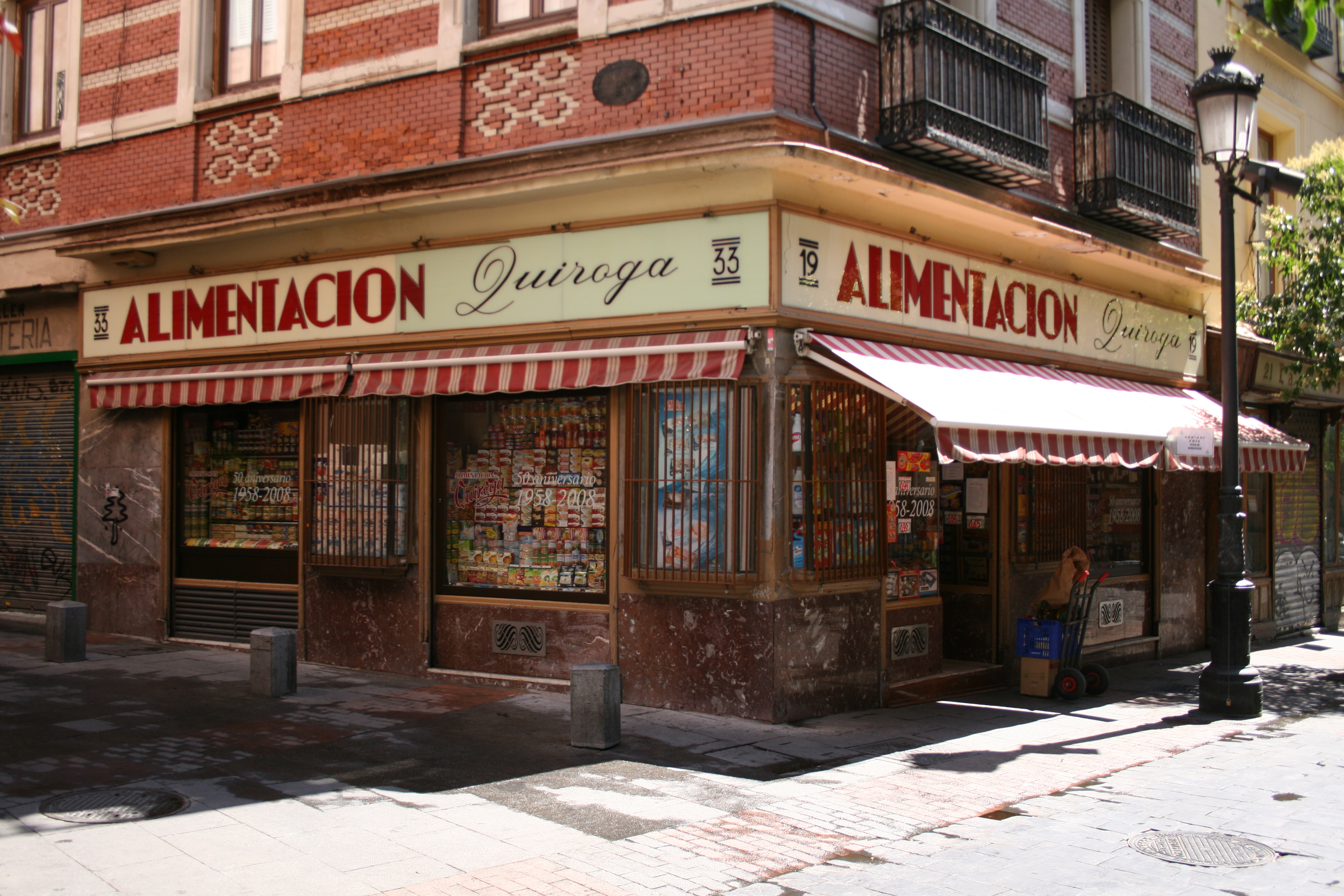 Tienda de ultramarinos, calle Huertas nº 19, calle de Echegaray nº 33, Madrid, España.